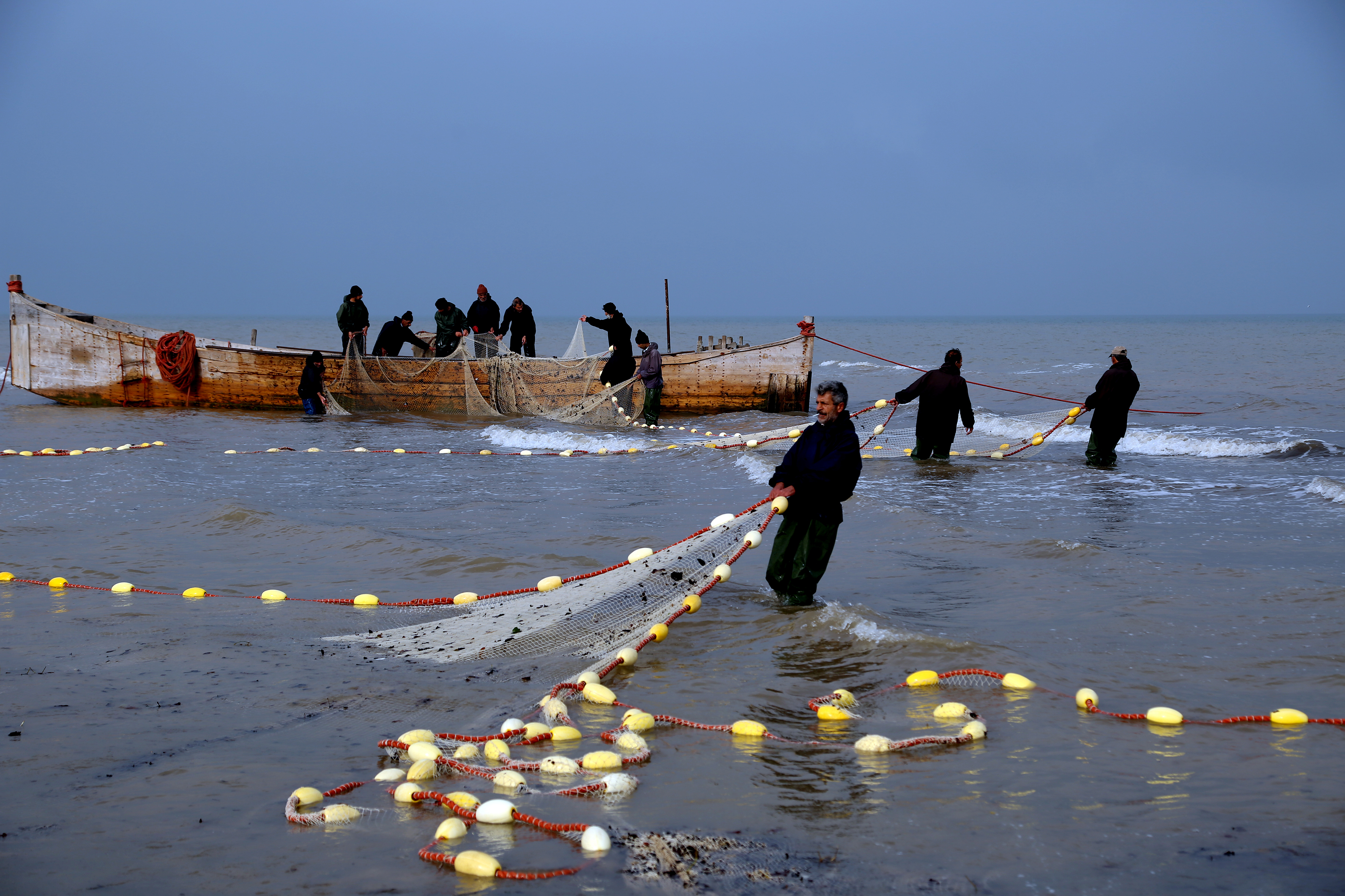 Bandar-e Anzali